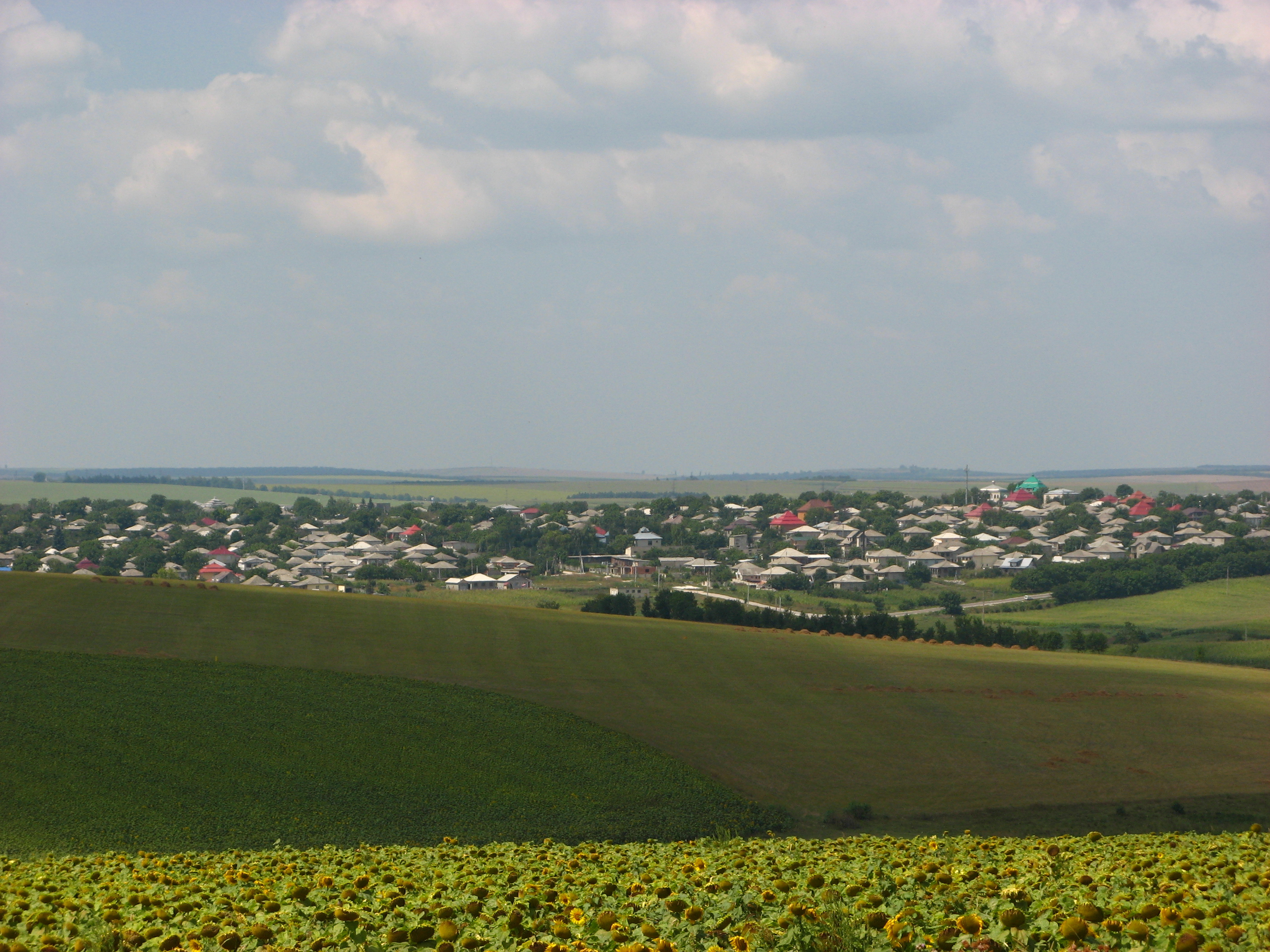 O vedere de ansamblu asupra orasului Riscani